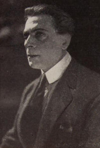 photo from journal FERT Produzione Cinematografica,, Primo bollettino, 1920.